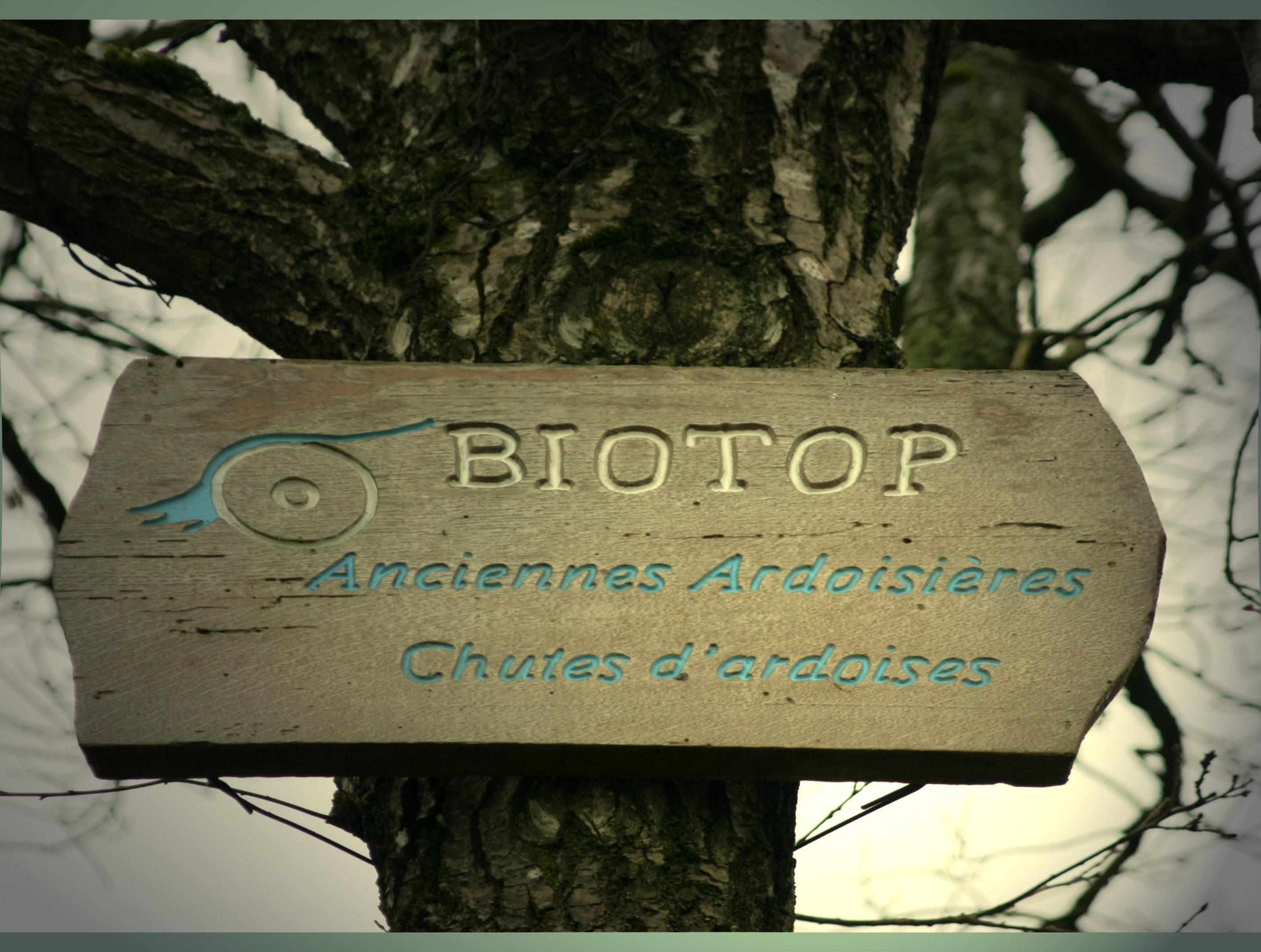 Schëld vum Biotop um Tipp vun de Leekolle bei Aasselbuer.